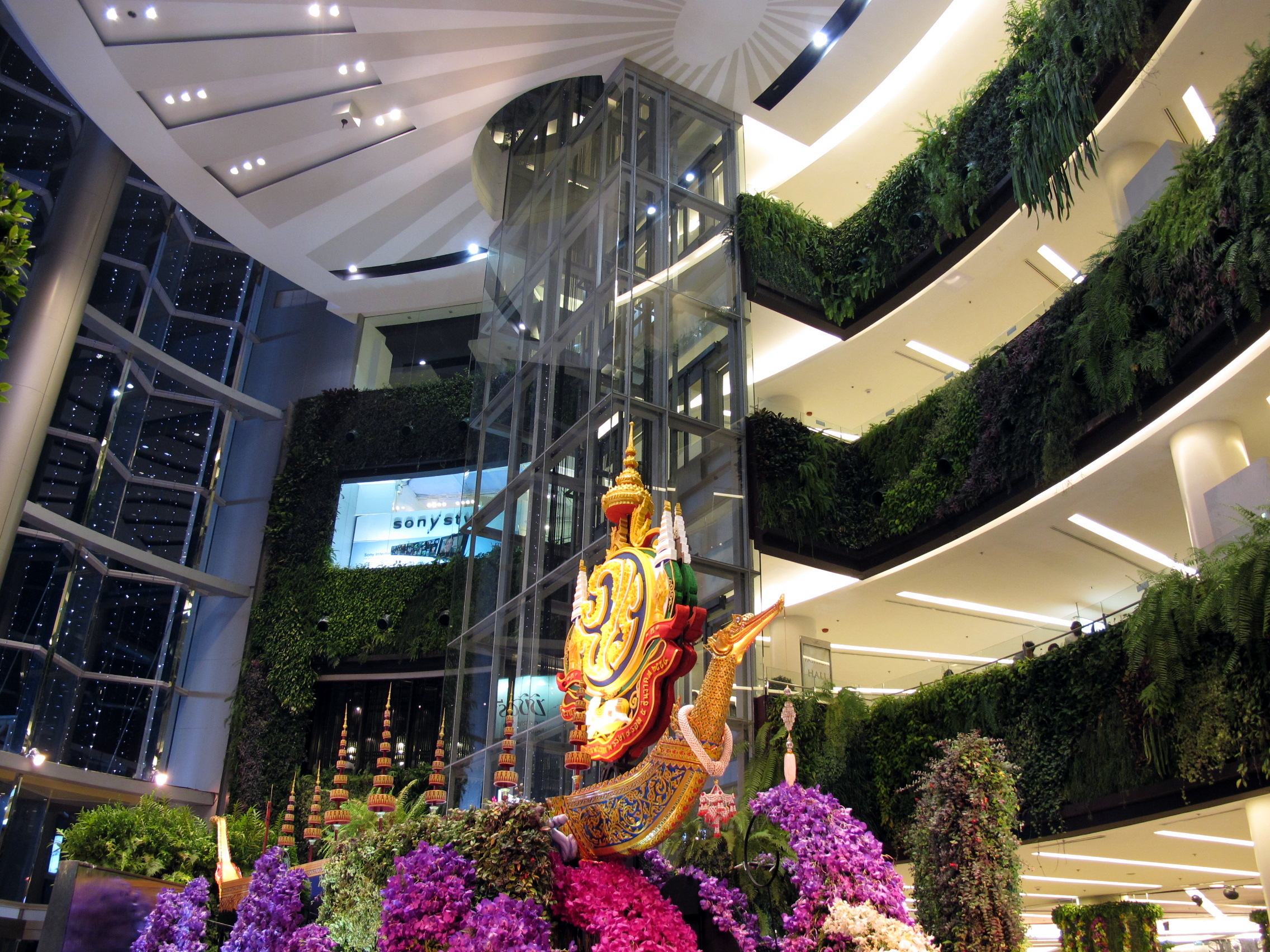 Siam Paragon Entrance Void